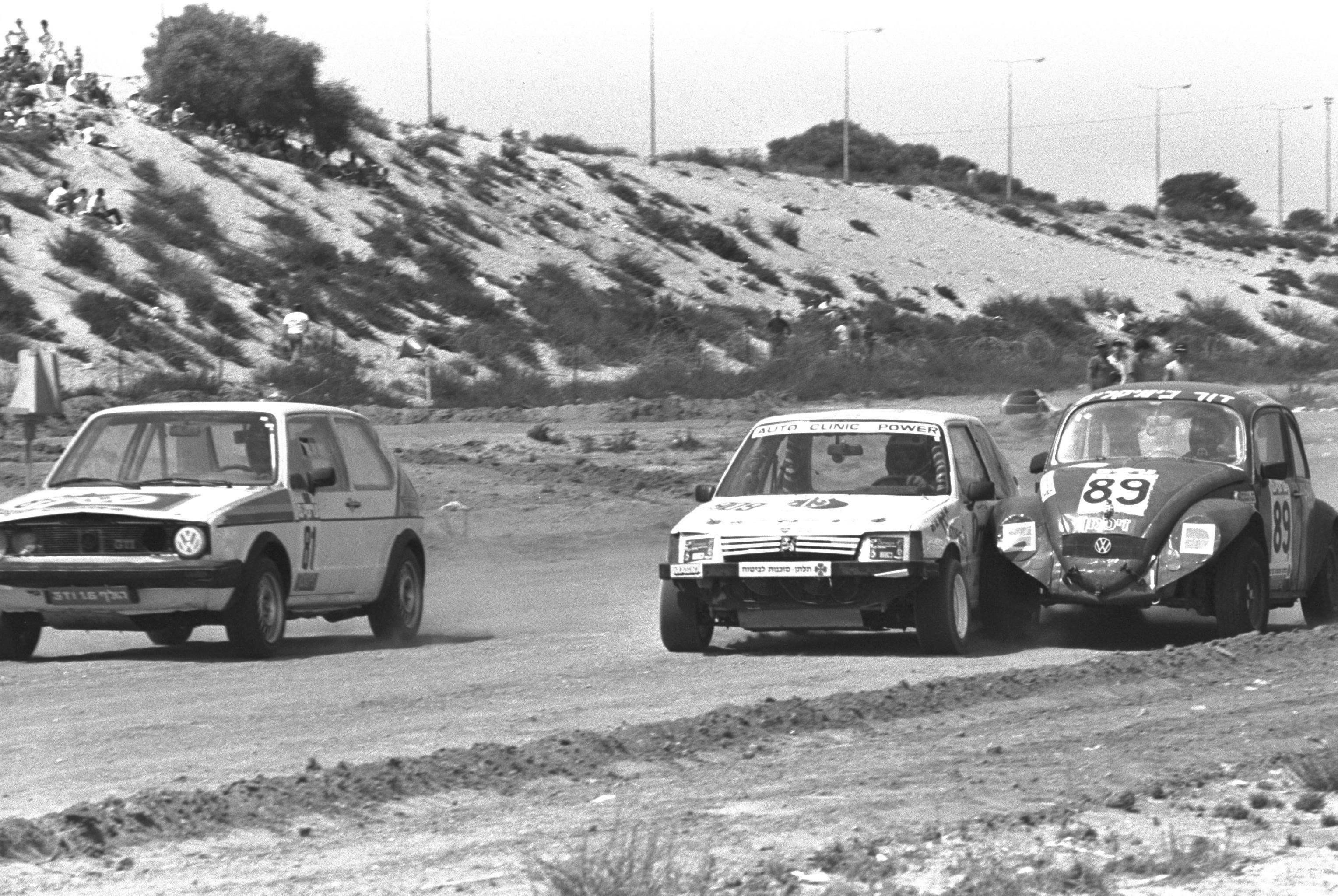 A COLLISION DURING THE 'RALLY CROSS' CAR RACE IN ASHKELON (10/07/1987). התנגשות מכוניות במהלך מרוץ המכוניות באשקלון